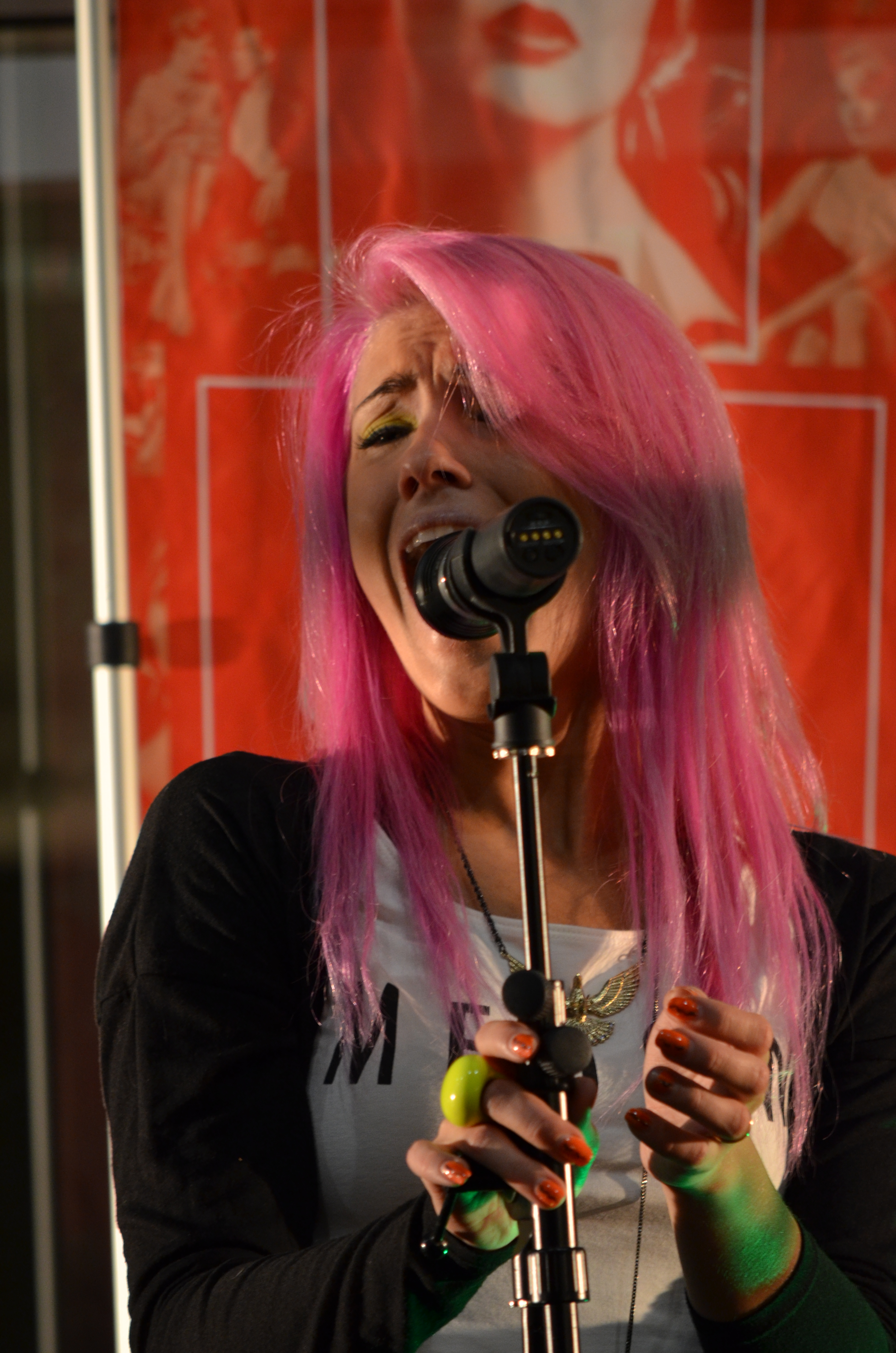 Muodin yö, LPR